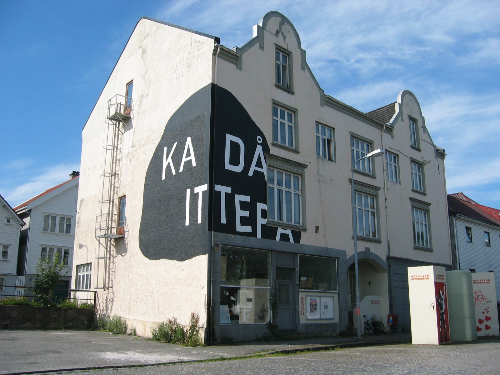 Fasade, Rogaland kunstsenter, 2007